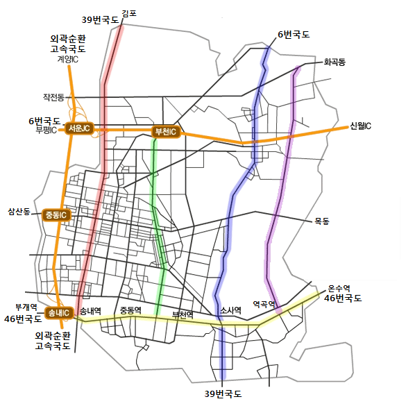 부천시도로망